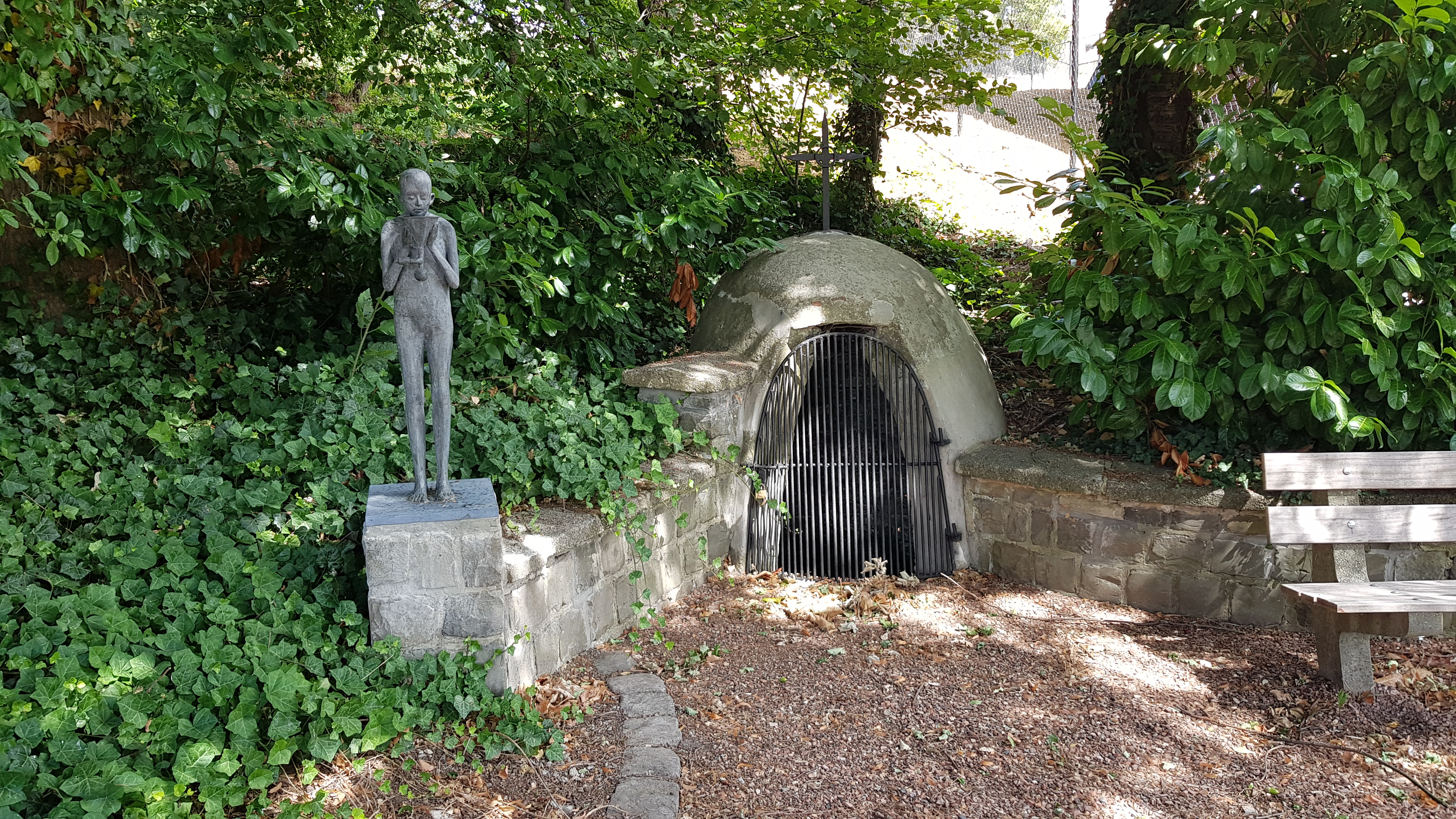 Sint-Bertiliabron, Rosmeer, Bilzen, België This photo of immovable heritage has been taken in the Flemish Region